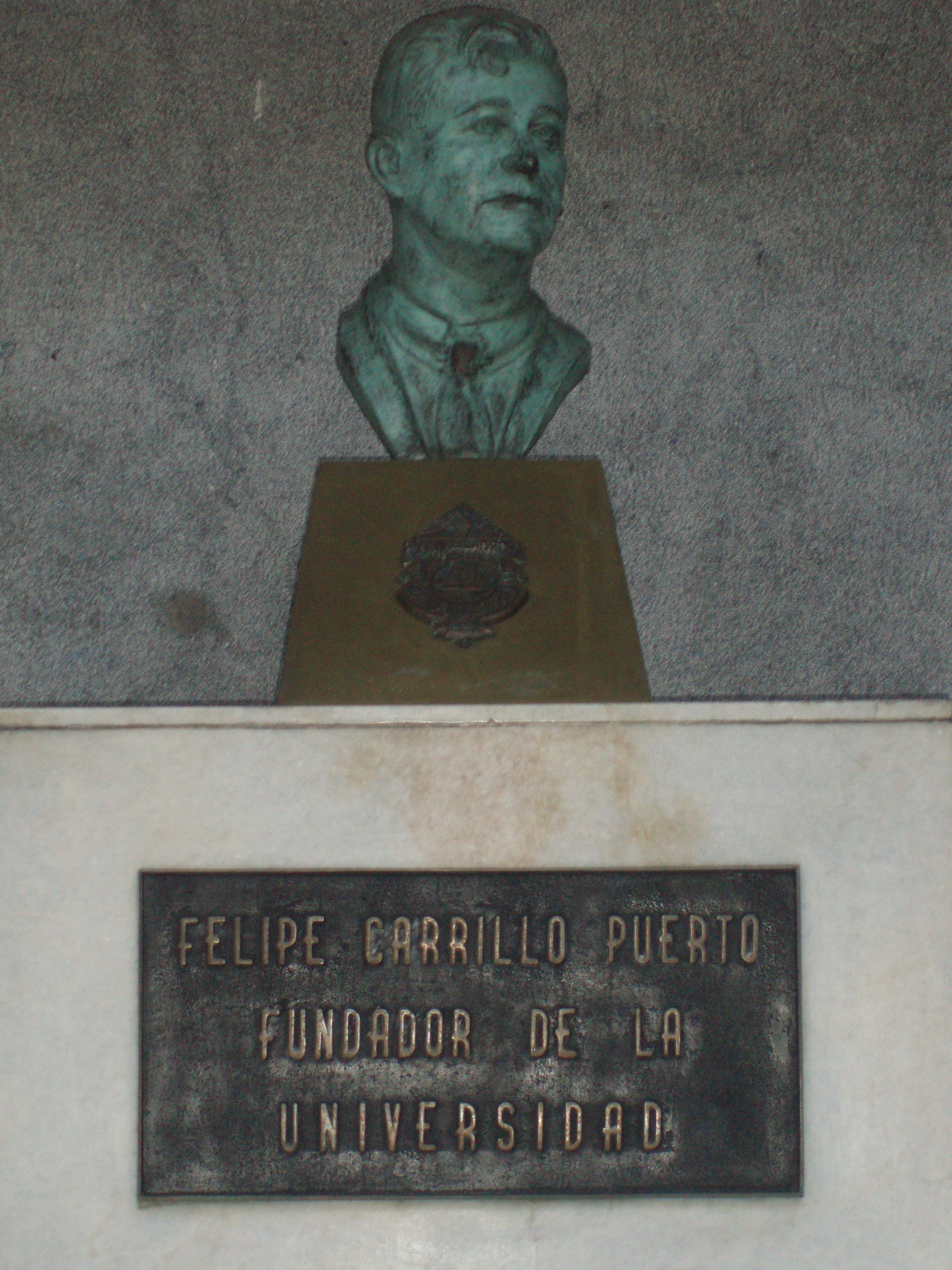 Busto de Felipe Carrillo Puerto a la entreda del Auditorio Felipe Carrillo Puerto en el edificio central de la UADY. Se lee la leyenda: FELIPE CARRILLO PUERTO FUNDADOR DE LA UNIVERSIDAD.